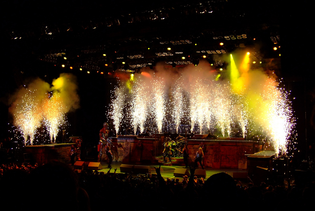 Gli Iron Maiden in una data del Somwhere Back In Time Tour 2008